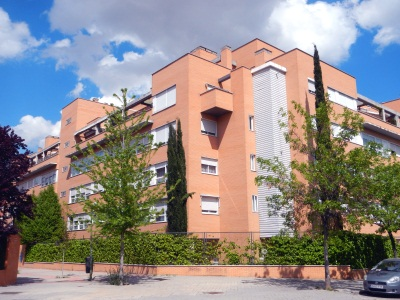 Un edificio en la calle del Cañón del Río Lobos, Madrid.